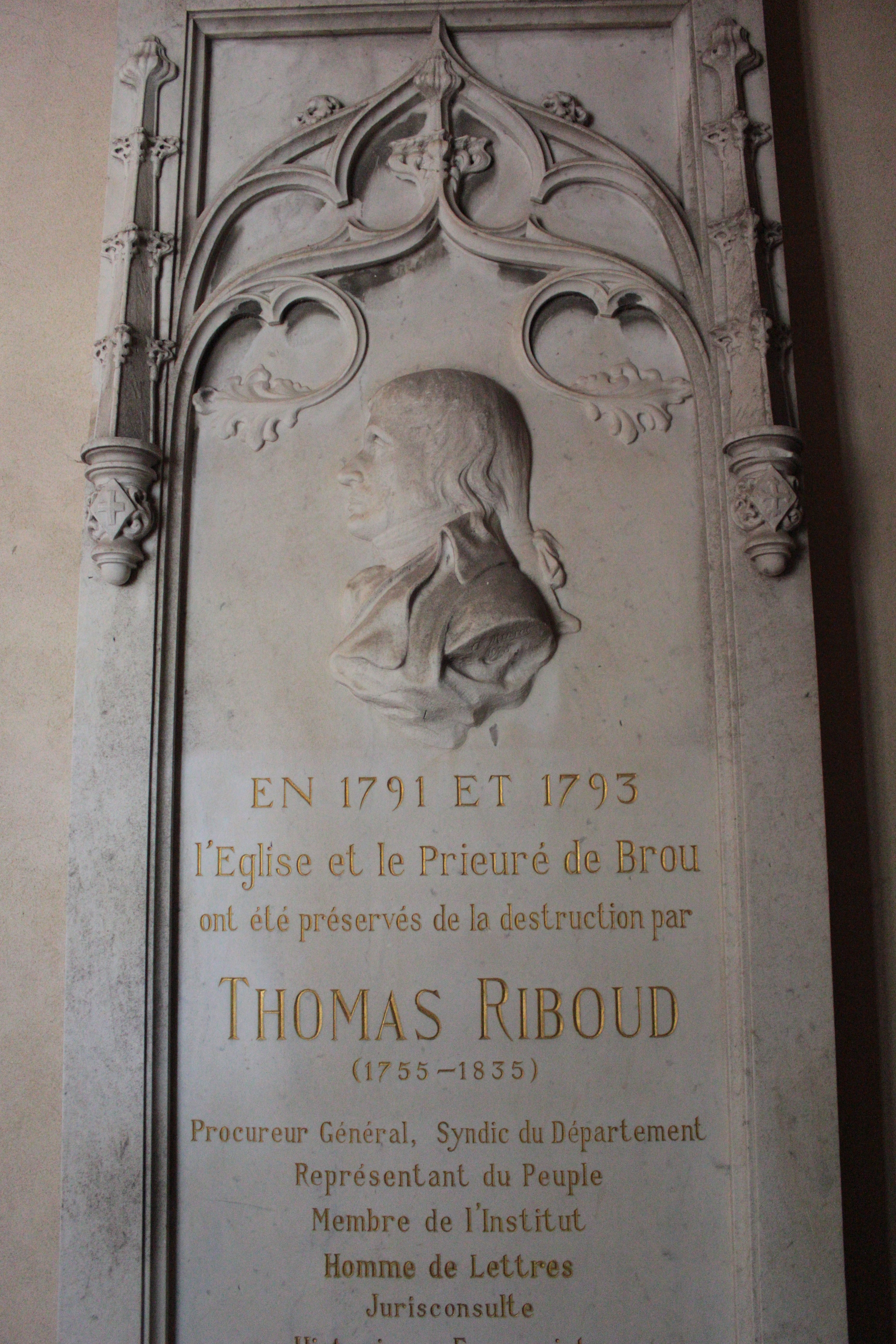 Plaque commémorative de Thomas Riboud (1755-1835) au monastère de Brou, département de l'Ain, France